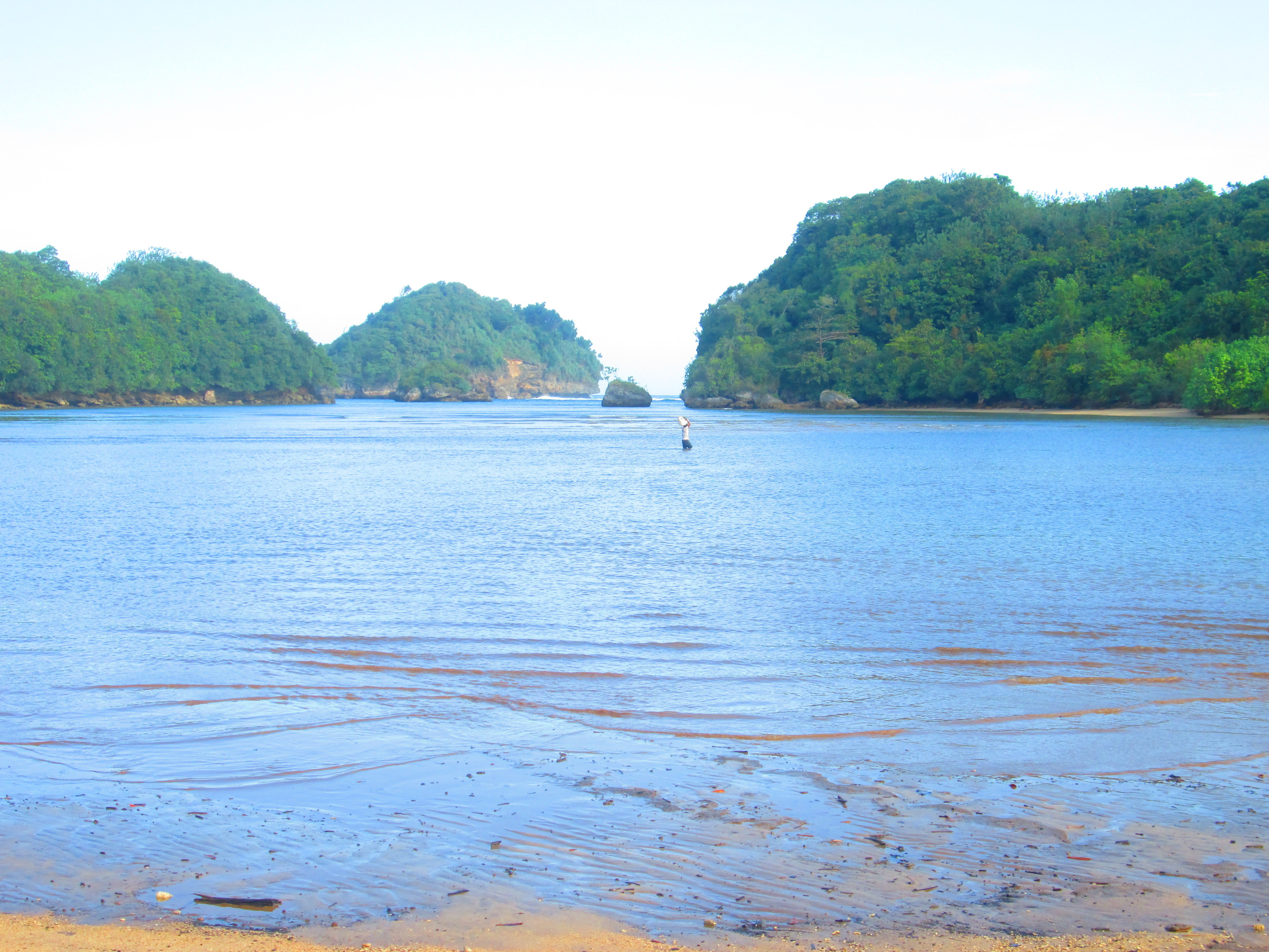 Pantai Clungup merupakan salah satu pantai yang terdapat di Kabupaten Malang Jawa Timur, tepatnya berada di dusun Sendangbiru Desa Tambakrejo. Pantai Clungup memiliki ombak yang sangat tenang ketika pasang, dan terlihat hamparan pasir yang indah ketika surut. Dilihat dari Maps, pantai terlihat seperti teluk, karena letaknya yang menjorok ke daratan. Pantai ini bersebelahan dengan pantai sendang biru, pantai Gatra dan Tiga Warna. Desiran ombak semakin indah dengan tanaman-tanaman mangrove yang mengelilingi pantai ini. I recommend this place as the best destination for your vacation.